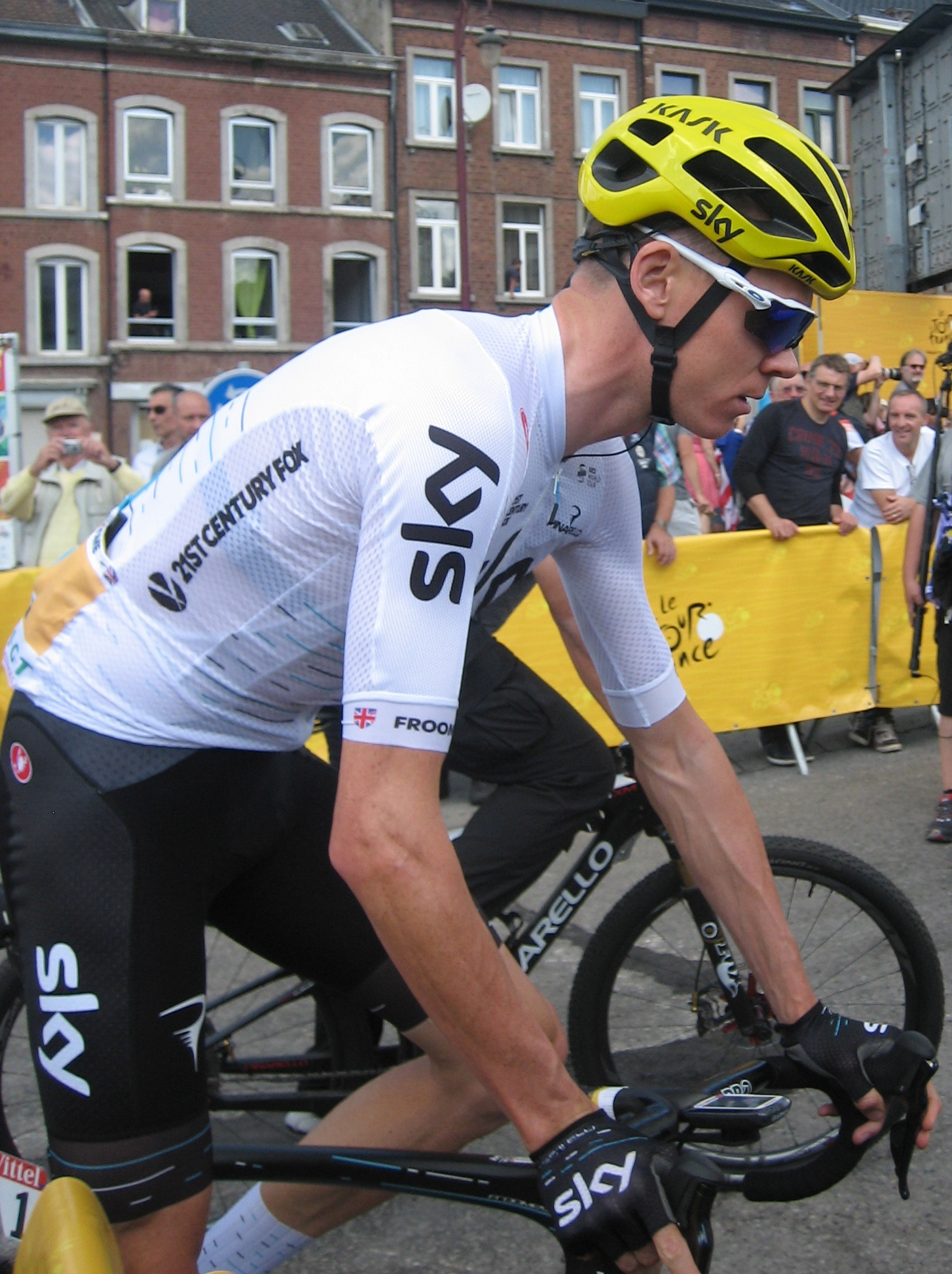 Start in Verviers (België) van de 3e etappe van Le Tour de France 2017.